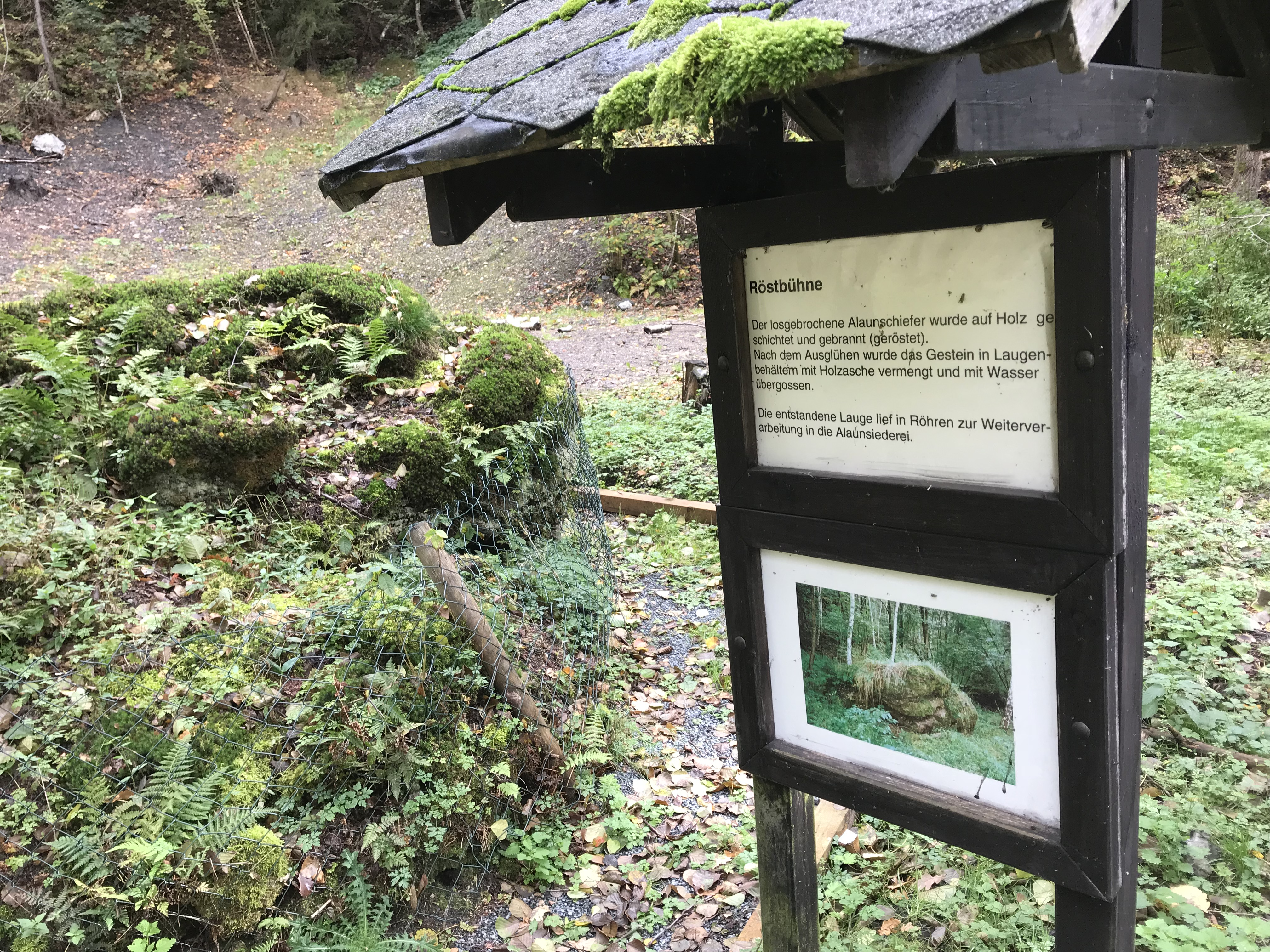 Röstbühne in Mühlwand